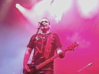 Fernando Madina de Reincidentes en un concierto en la sala Razzmatazz de Barcelona en mayo de 2008